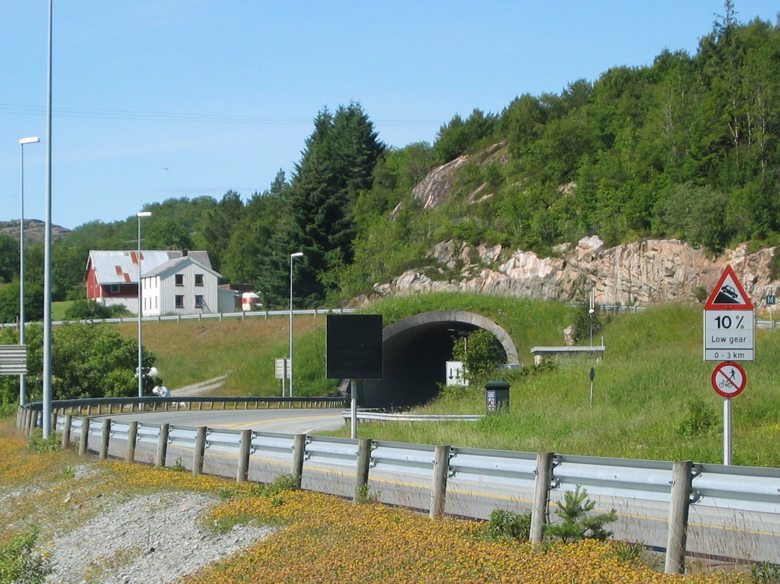 Hitratunnelen, eastern entrance (from Hemnskjel)